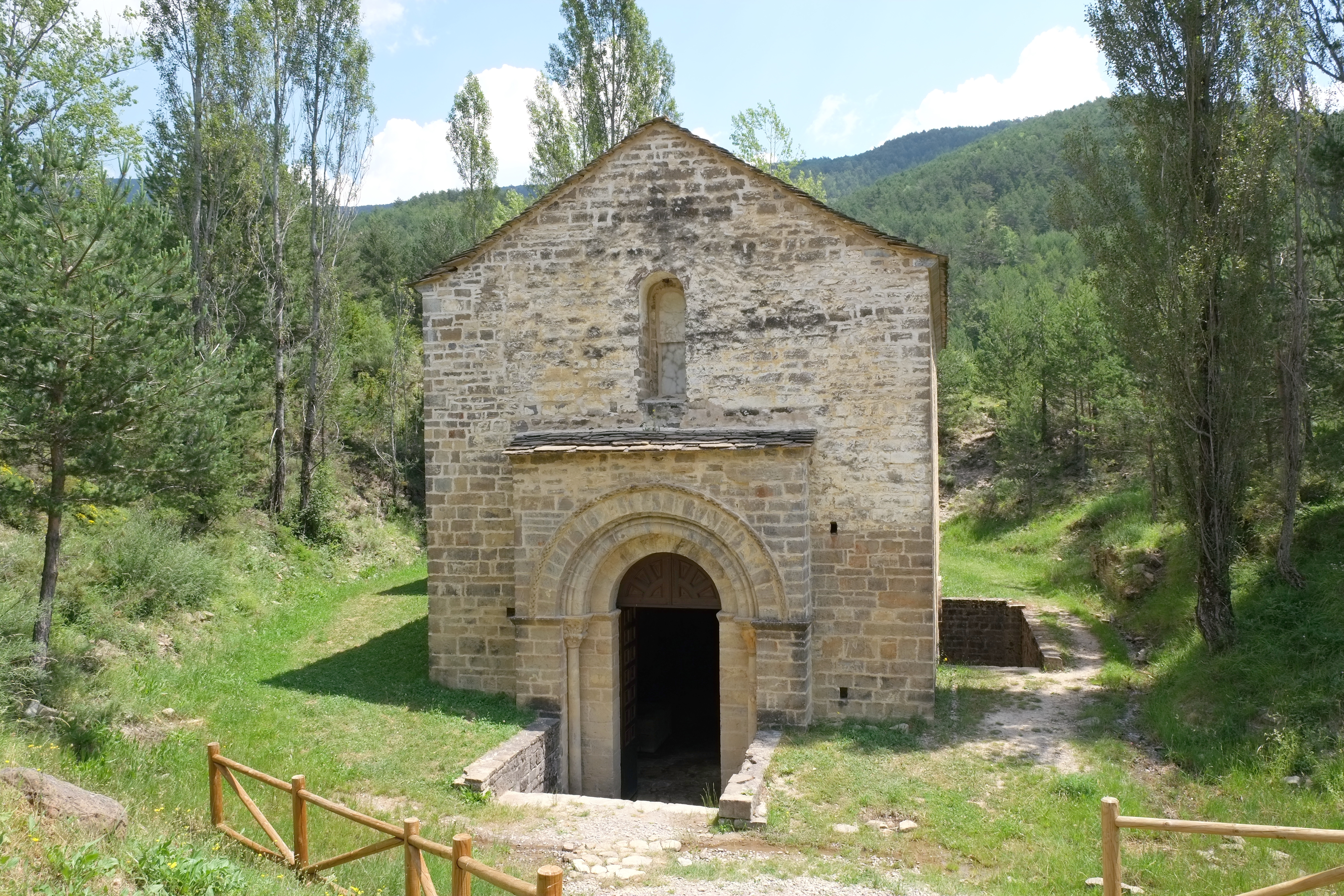 Ehemalige Klosterkirche San Adrián de Sasabe in Borau in der Provinz Huesca in Aragonien (Spanien)